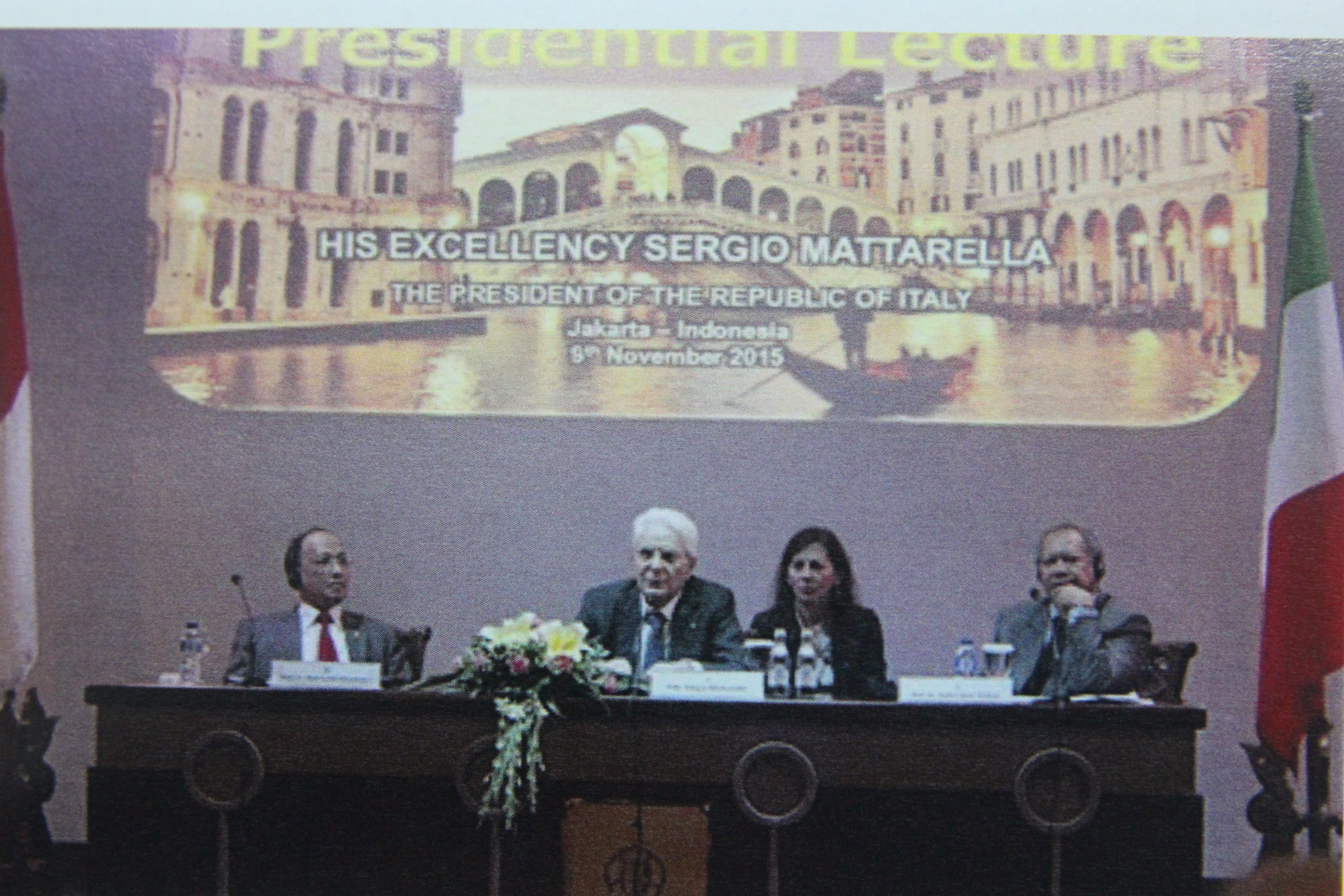 Presidential Lecture Sergio Mattarella